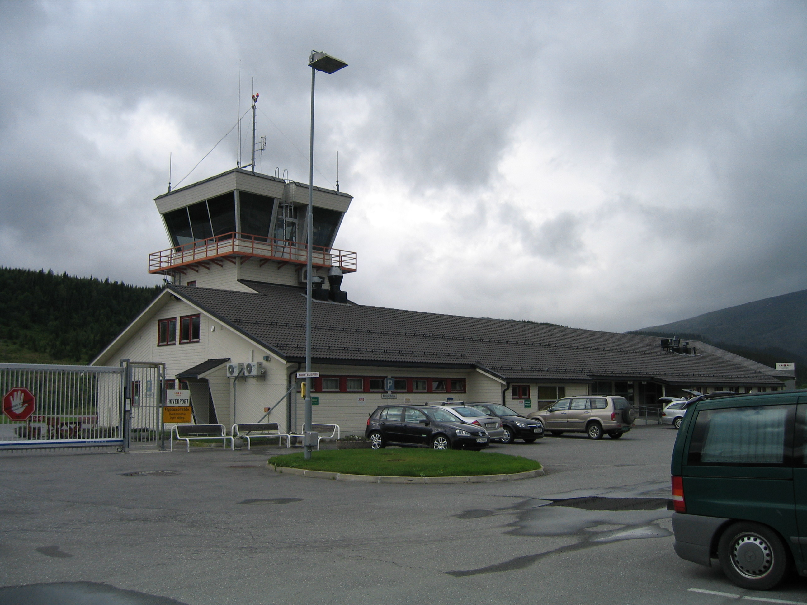 Mosjøen lufthavn, Norway (MJF). Picture taken by user:ZorroIII.